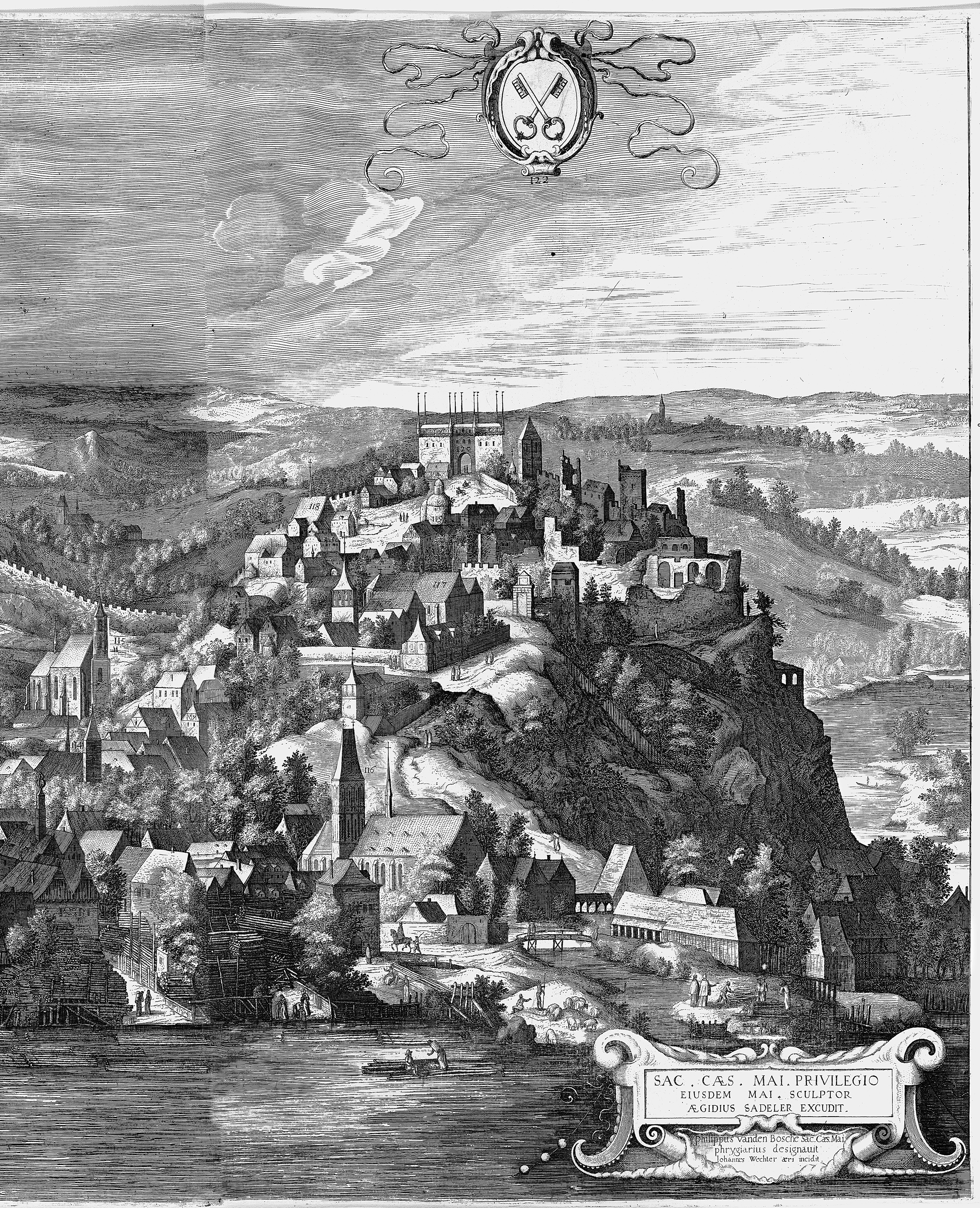 Výřez z tzv. Sadelerova prospektu, který zobrazuje Vyšehrad a jeho okolí.